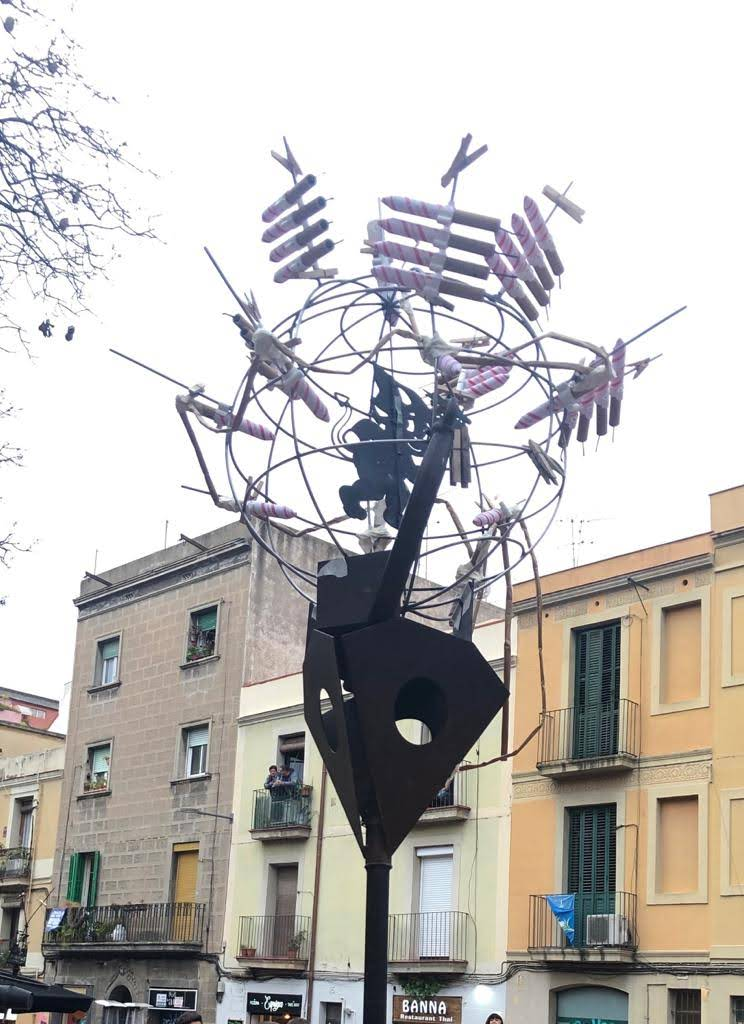 Típica forca dels Llucifer